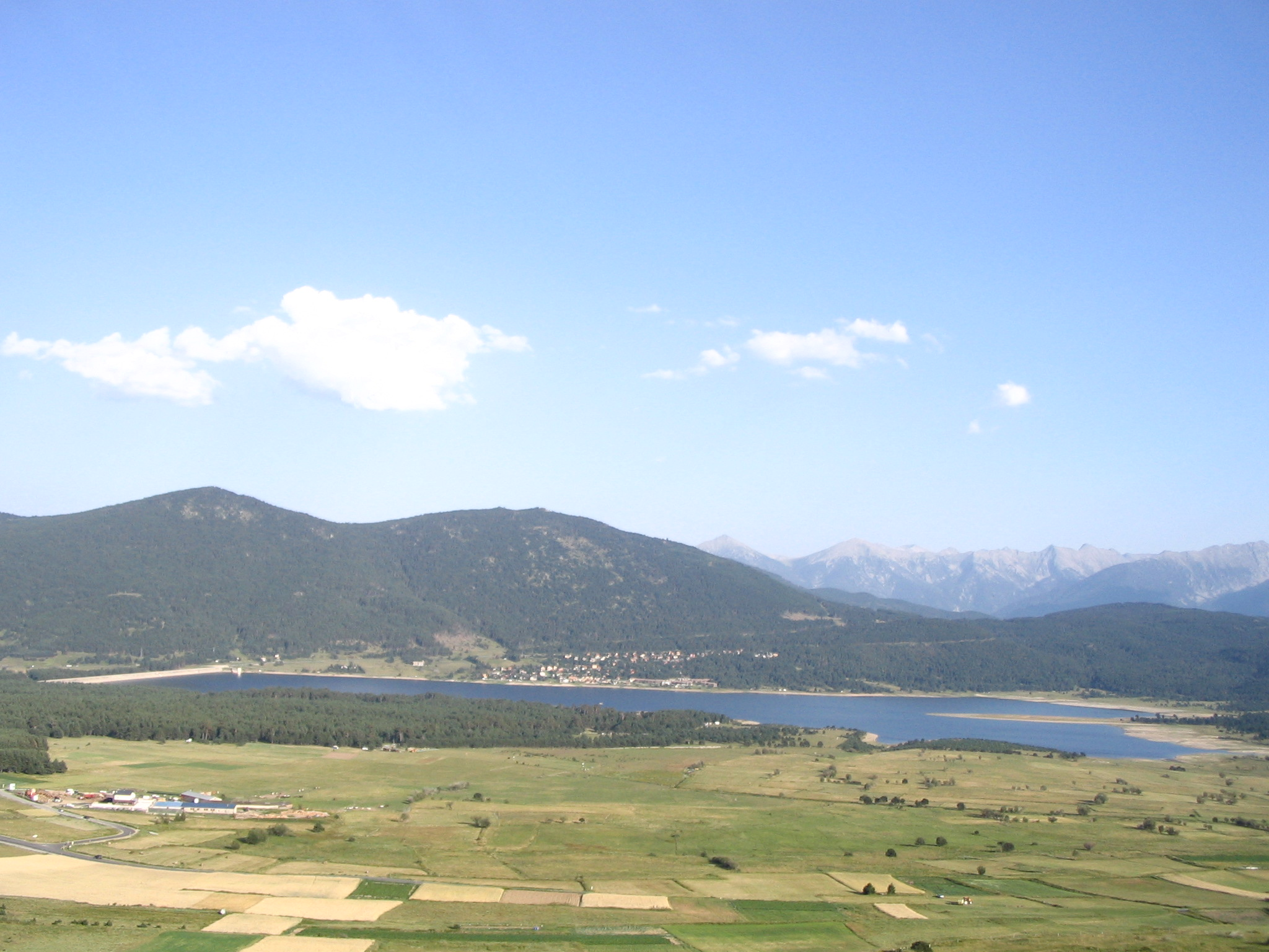 Vue depuis Les Angles sur le lac de Matemale